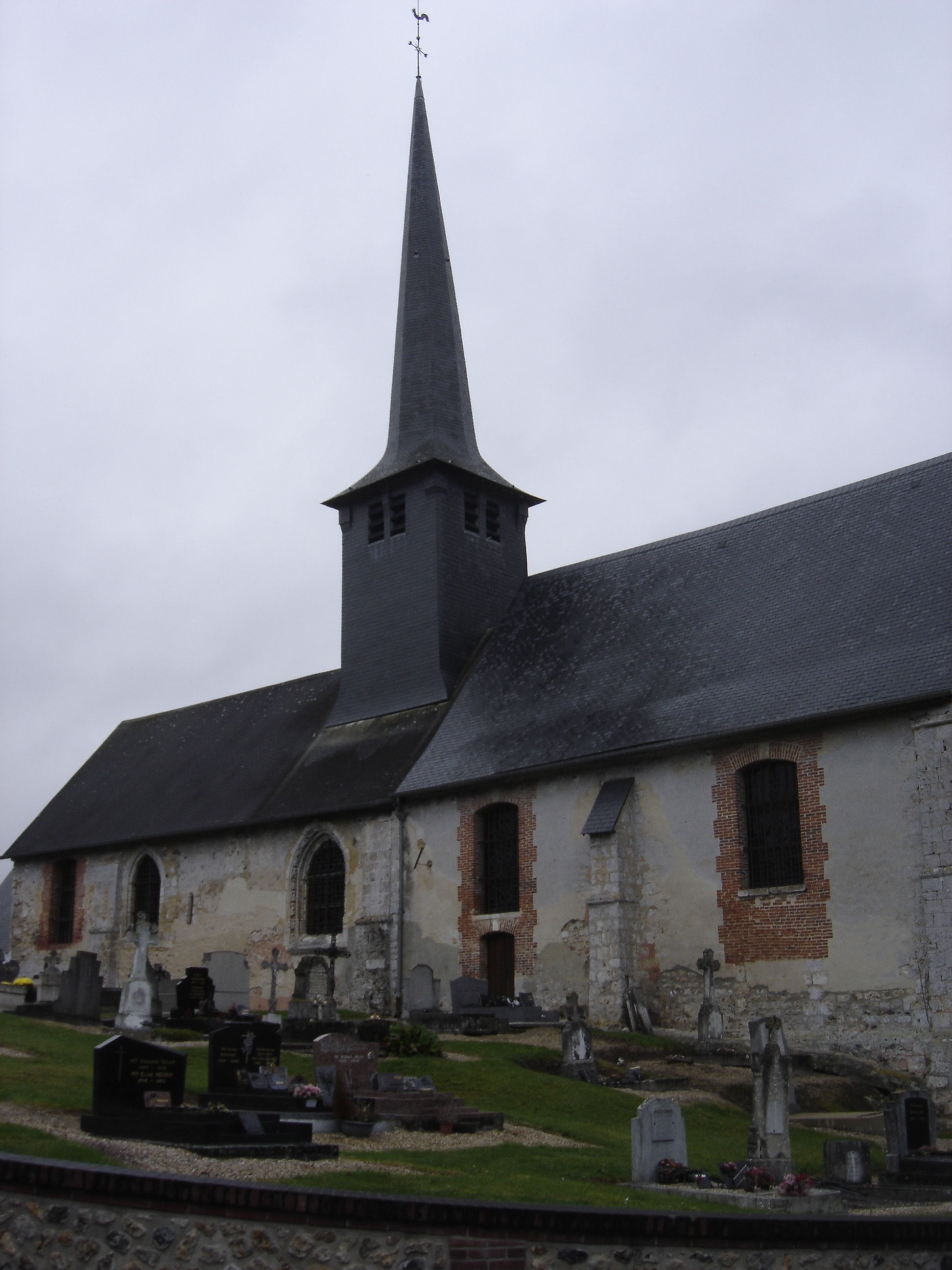 Eglise de Triqueville - Eure - France